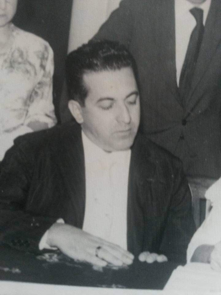 Para uso no artigo sobre Silvério Neto na Wikipédia